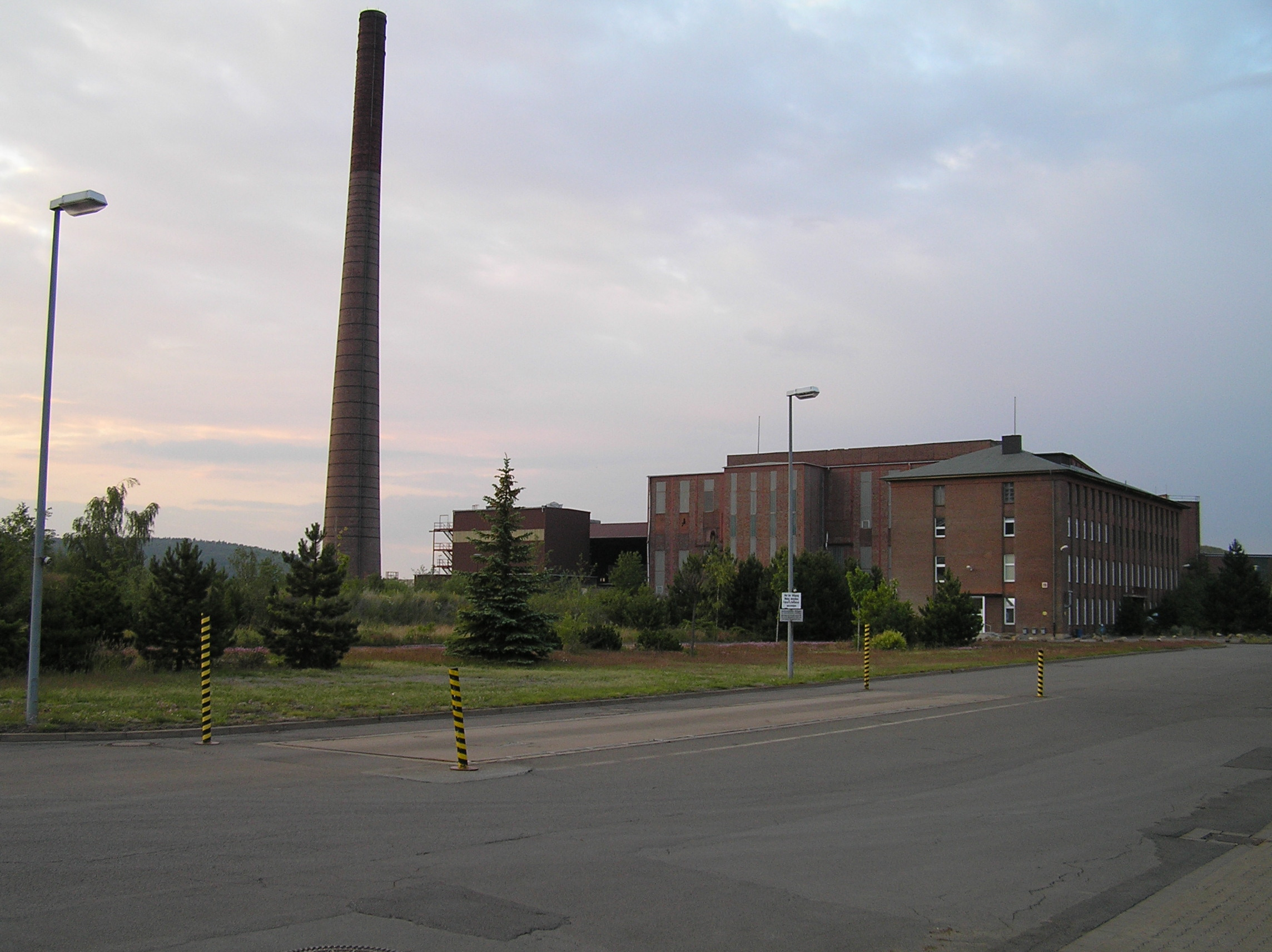 Modernes Schmelzhüttengebäude Bleihütte Oker